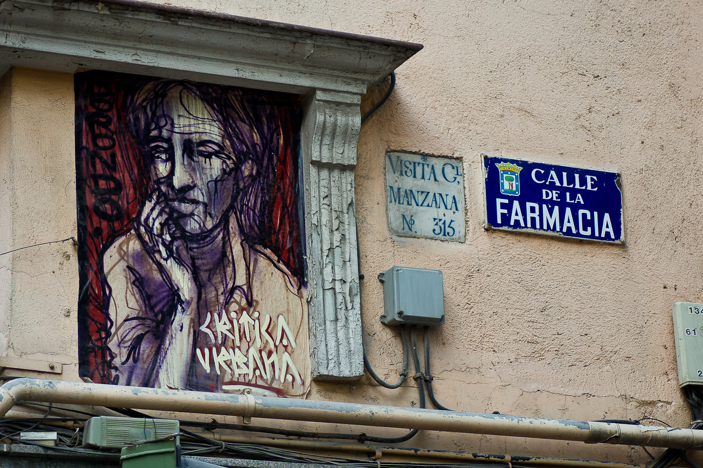 Calle de la Farmacia, esquina con calle Fuencarral, Madrid, España.